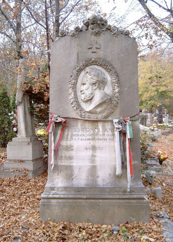 Kherndl Antal (Zselíz, 1842. máj. 10. – Bp., 1919. okt. 7.): mérnök, műegyetemi tanár sírja Budapesten. Farkasréti temető: 8/1-1-35/36 szobrász:Bory Jenő, építész: Wälder Gyula.